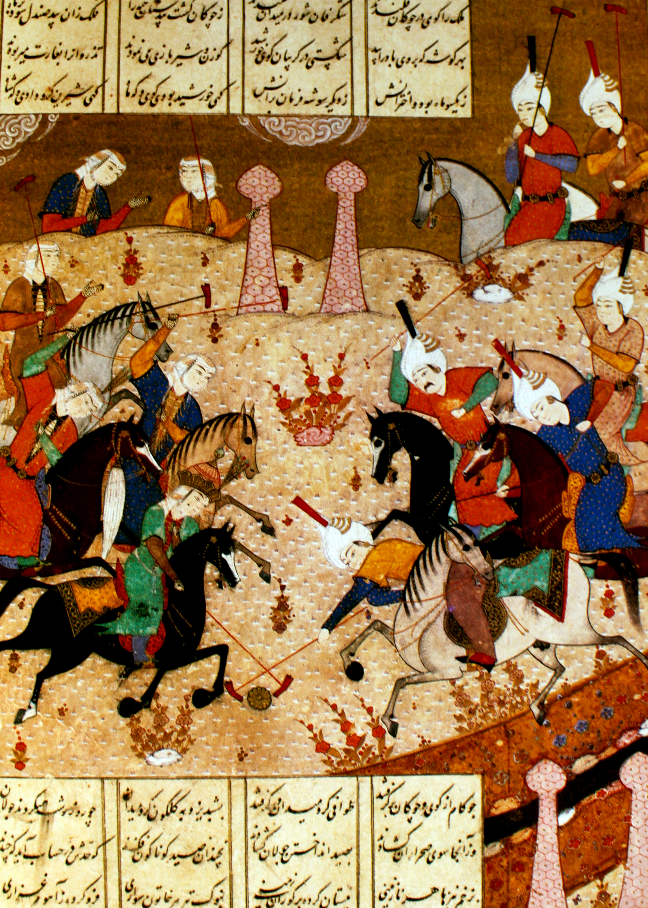 Xosrov və Şirin çovkan oyunu zamanı, 1543-1544, Şiraz